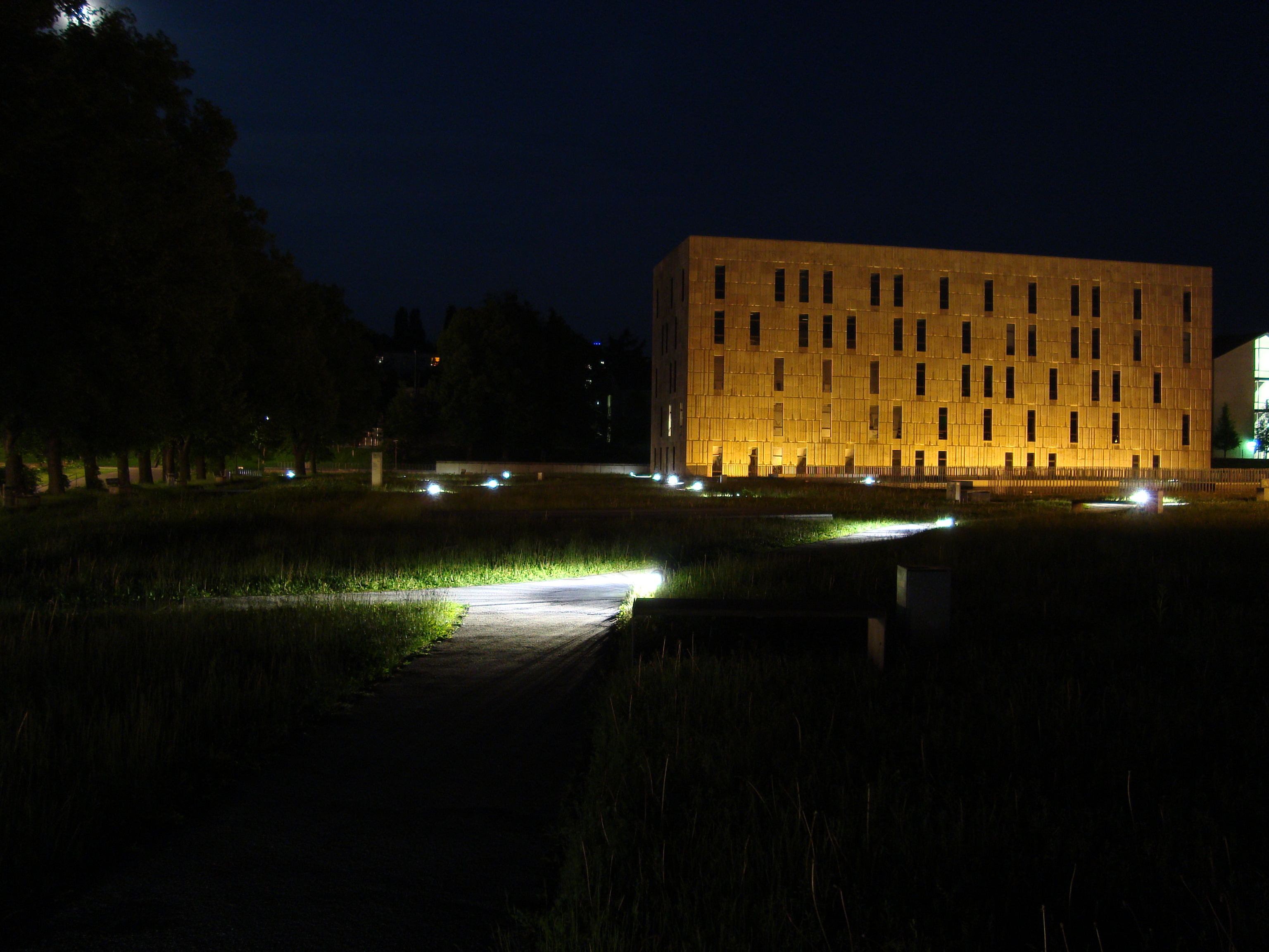 SLUB Dresden exterior at night (Zentralpunkt Zellescher WEG 18/ Central-Point Zellescher WEG 18).